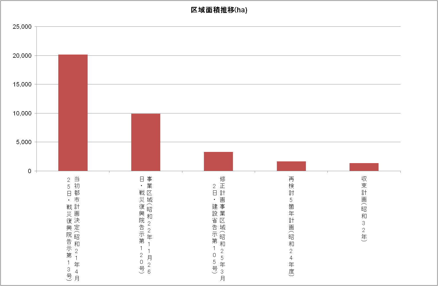 戦災復興事業区域面積推移（東京都・単位：ha）※数値は建設省「戦災復興誌」及び東京者騨支災復興土地区画整理事業誌「蘇った東京」による